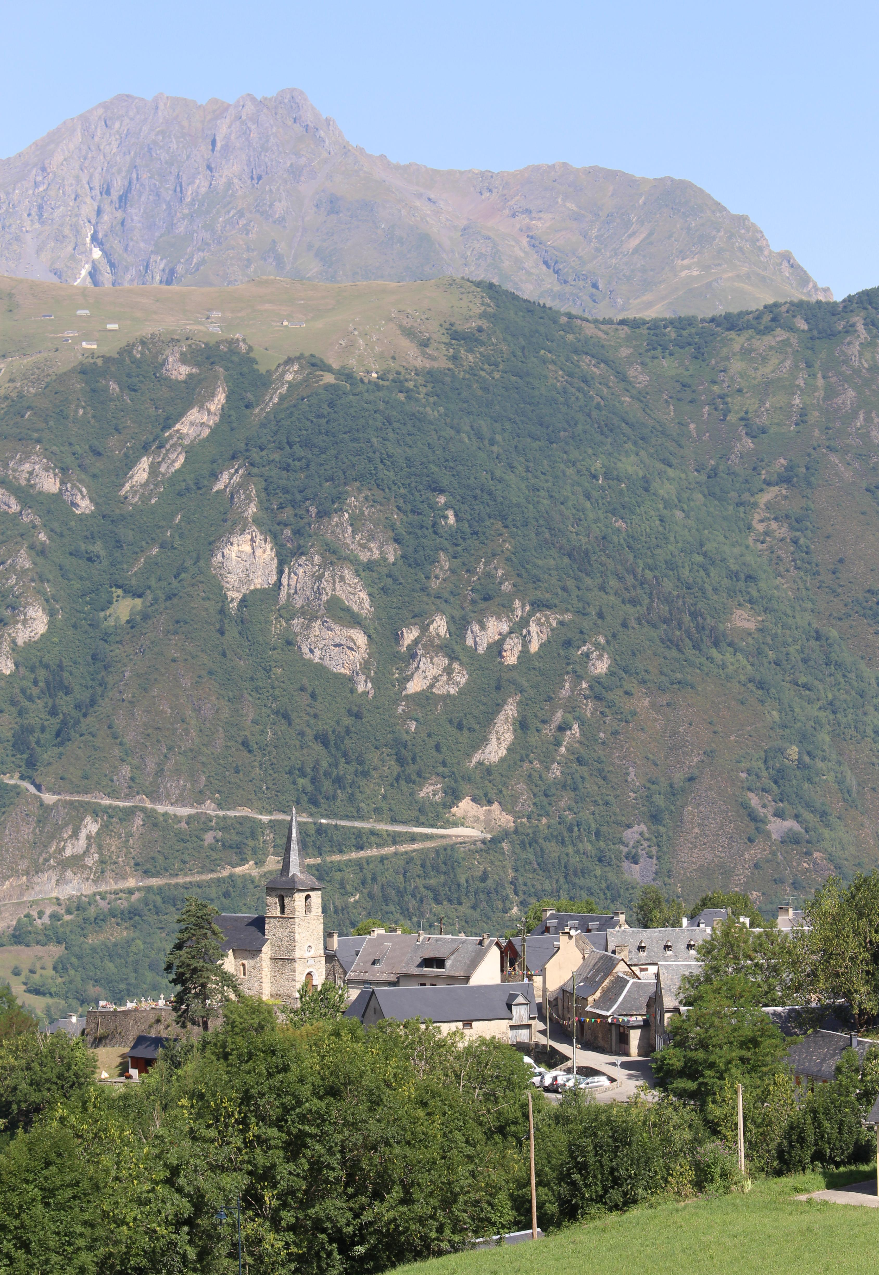 Estensan (Hautes-Pyrénées)